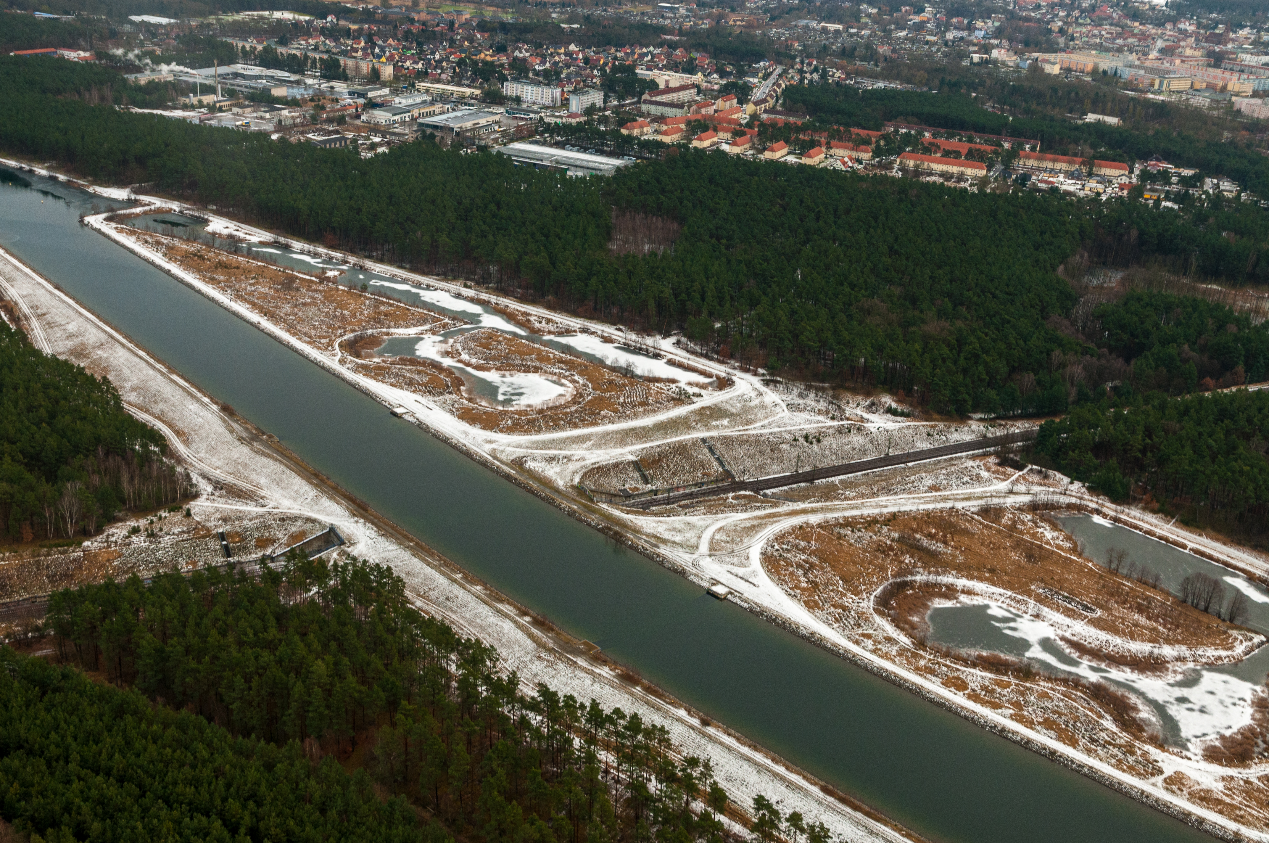 Kanalbrücke Eberswalde